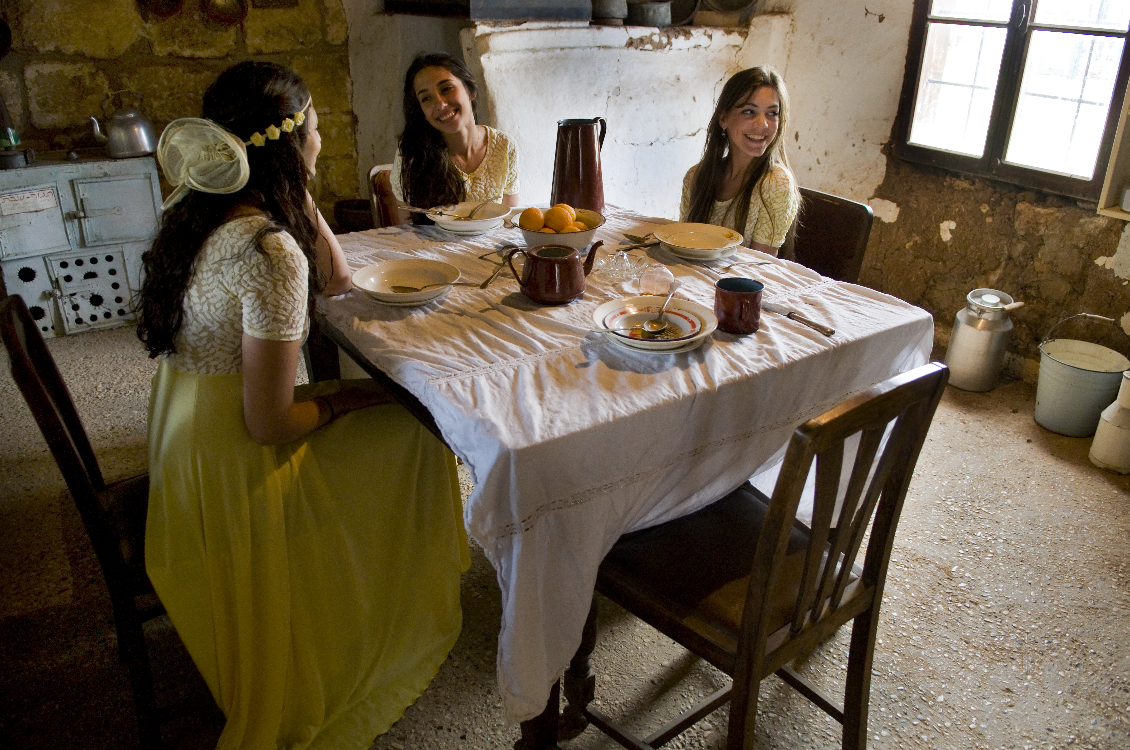 בשנת 1909 התיישב ביסוד העלה יואב דוברובין ומשפחתו. בעזרת הידע הרב בחקלאות הקימה משפחת דוברבין חצר אחוזה גדולה ובה משק משגשג. בשנת 1982 הפך המקום למוזיאון.